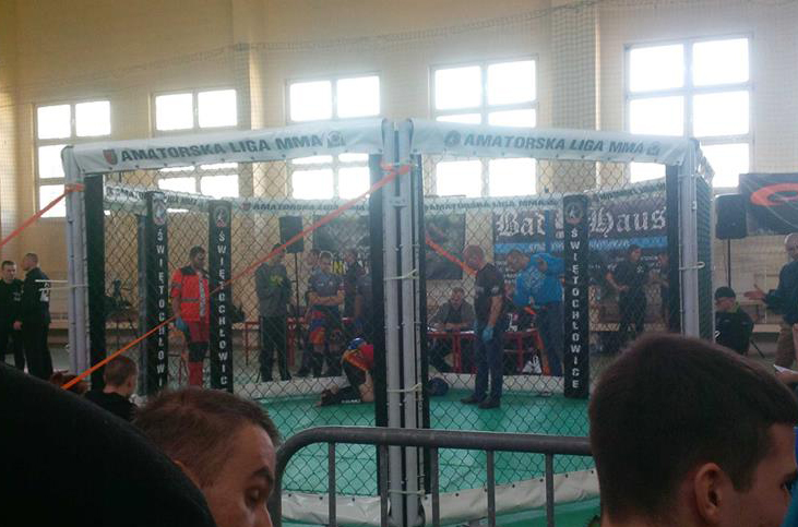 Zawody Amatorskiej Ligi MMA 74 (ALMMA) w Świętochłowicach